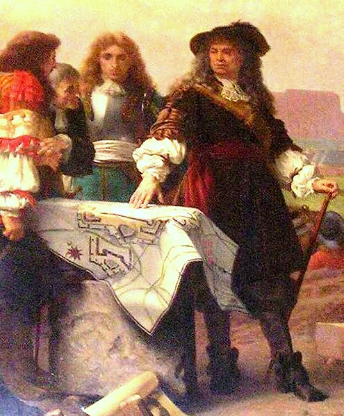 Vauban als Baumeister in Belfort, Gemälde im Rathaus-Ehrensaal